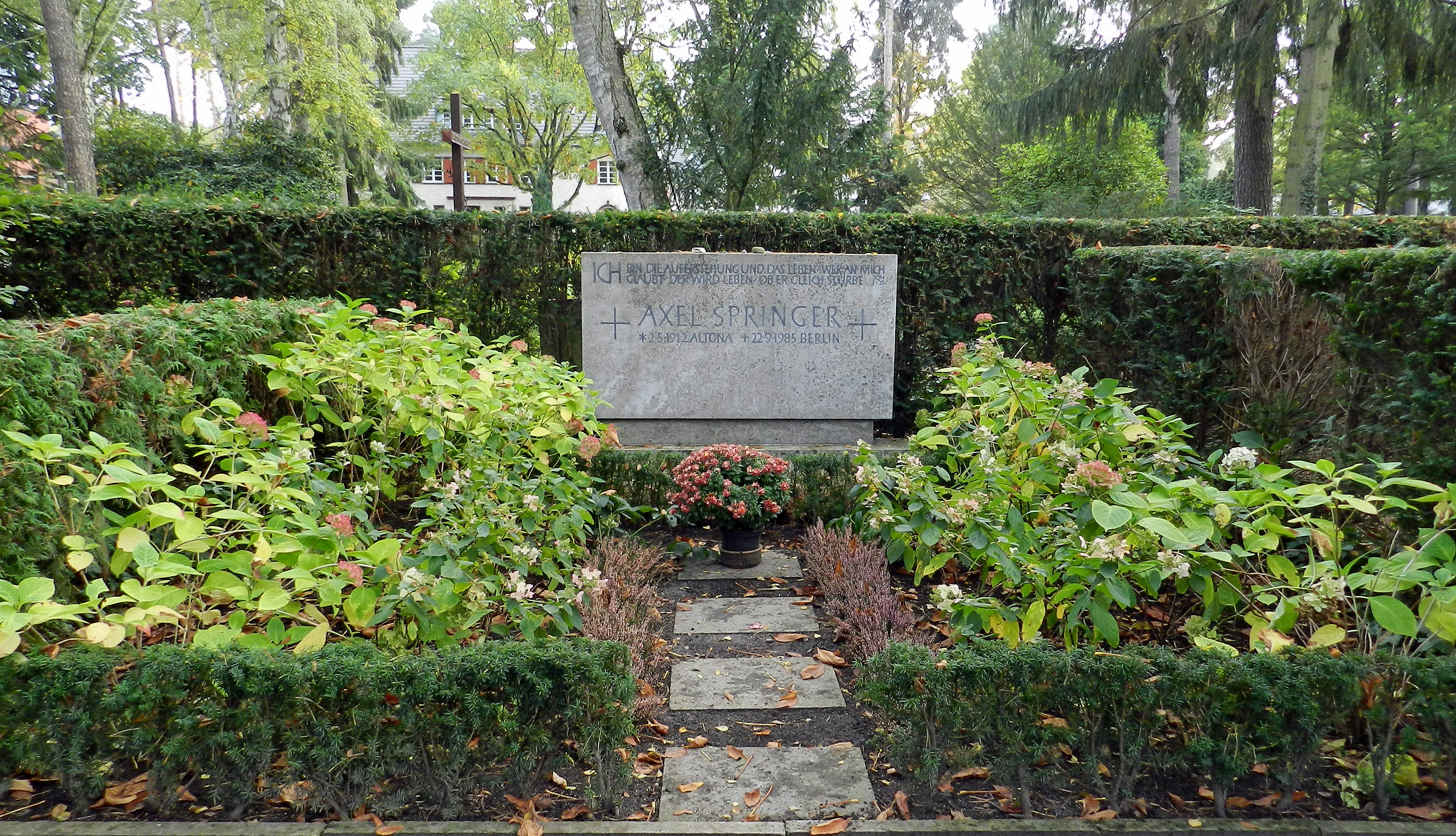 Grab von Axel Springer auf dem Friedhof Nikolassee in Berlin-Nikolassee.